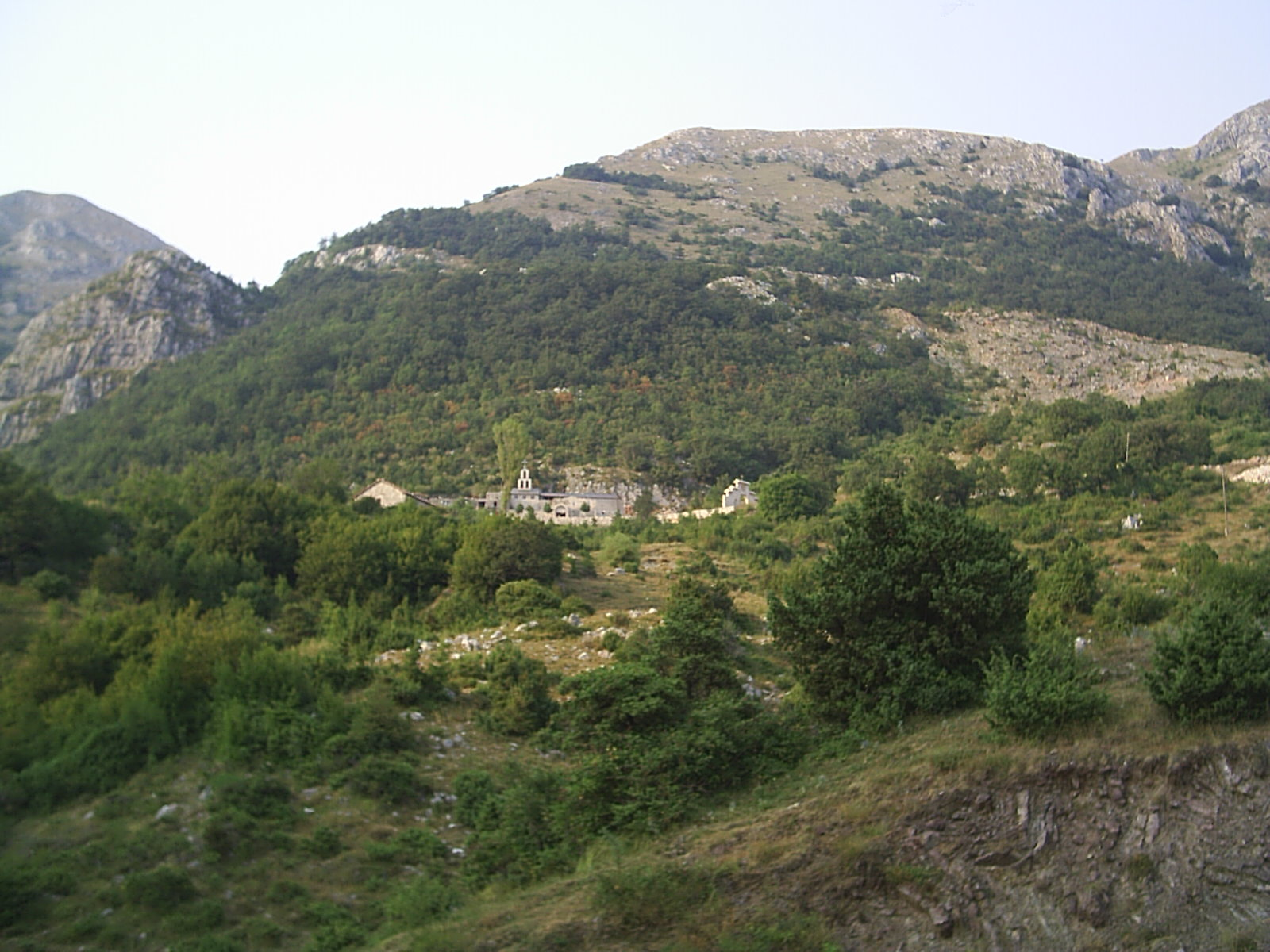 Вид на монастырь Станевичи